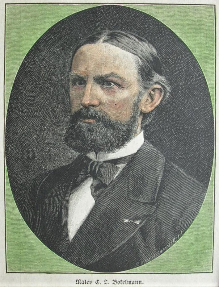 C. L. Bokelmann, Maler, kolorierter Holzstich, 13 x 10 cm